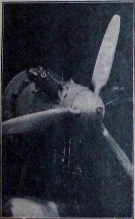 Motore Fuscaldo a 3 cil a stella da 50 hp.